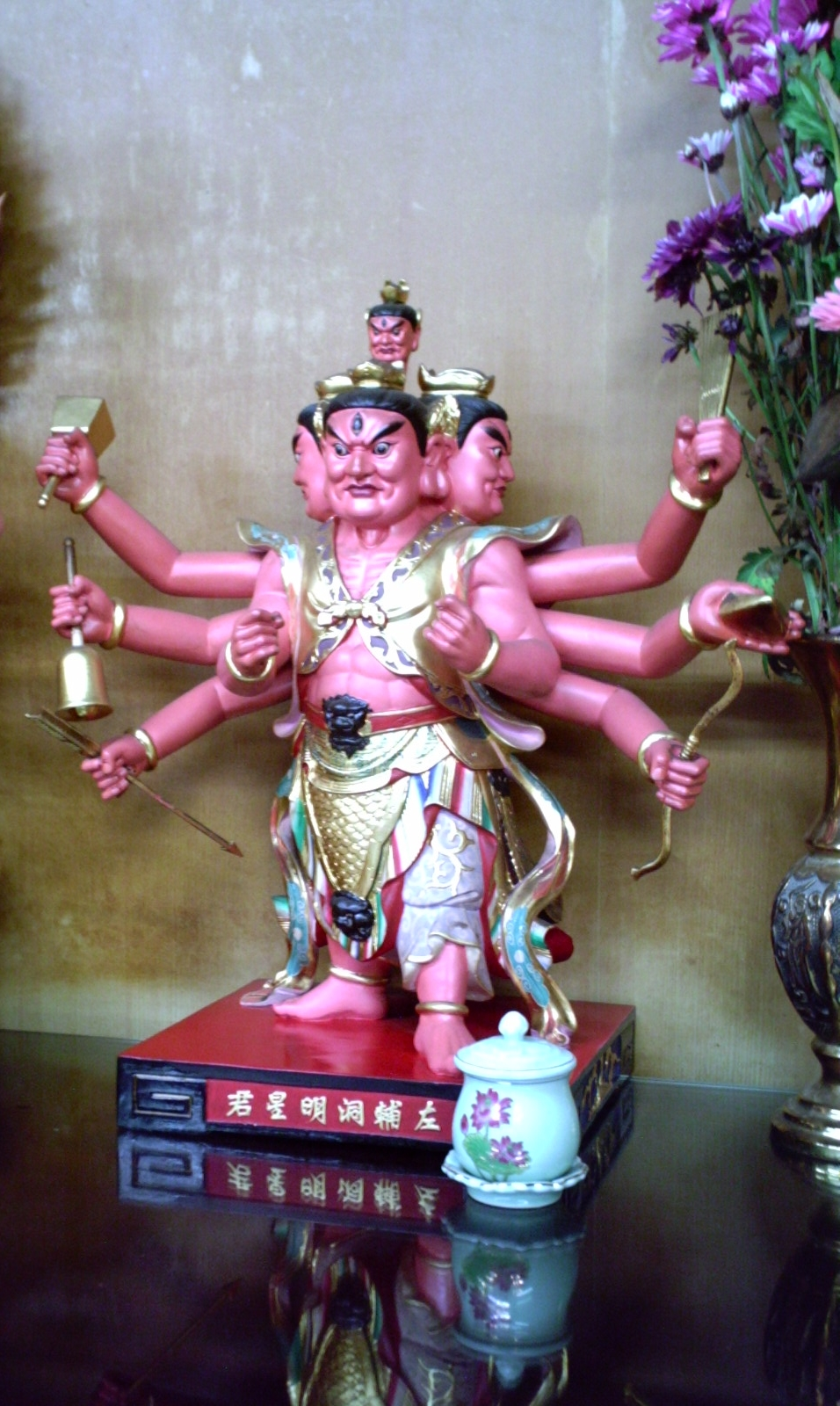 中文（台灣）: 左輔洞明星君